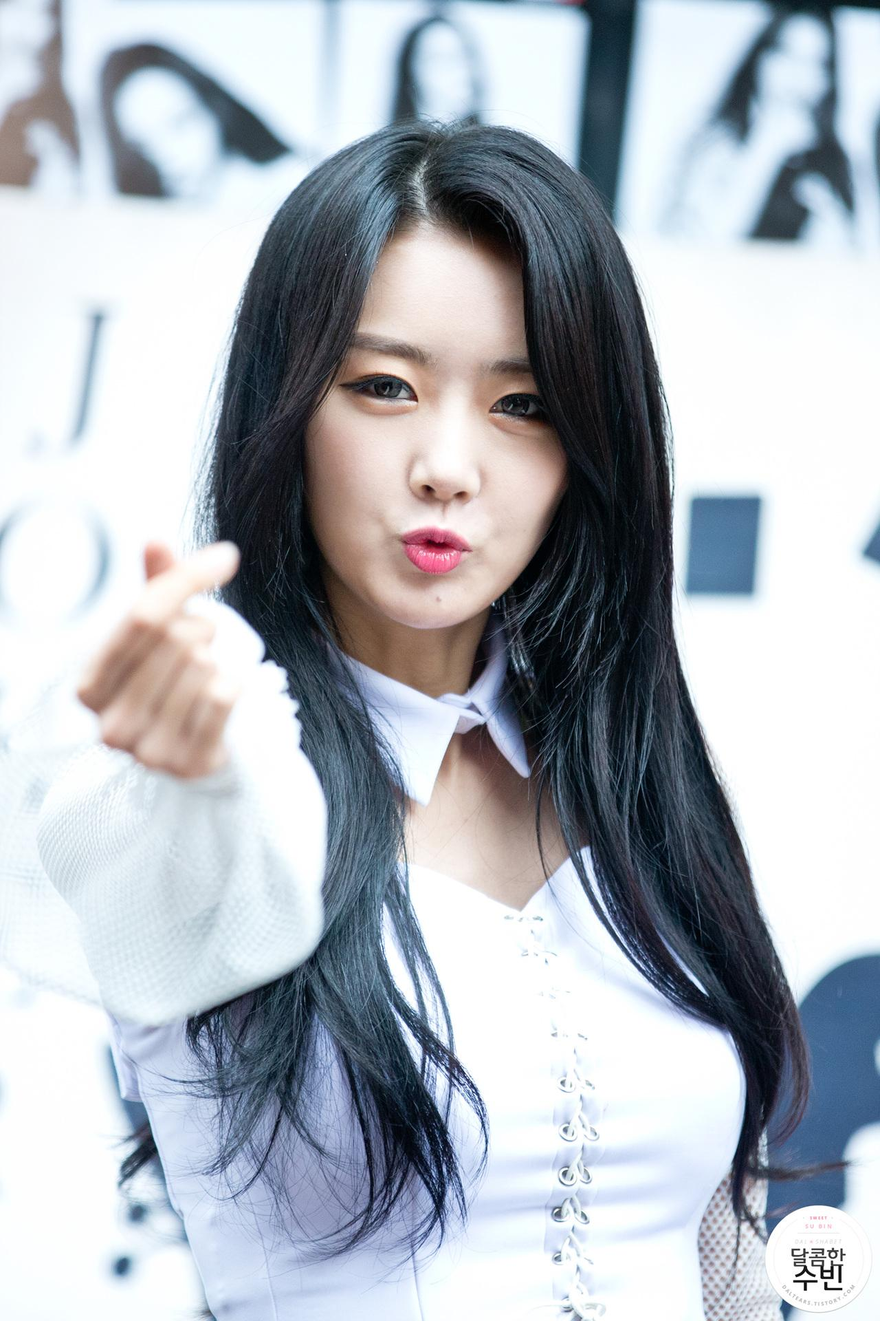 [15.05.03] 명동 게릴라 직찍 ( 달샤벳 수빈 )